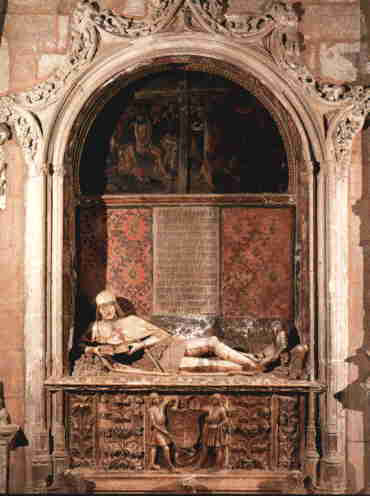 Sepultura del Doncel.